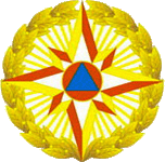 эмблема МЧС Азербайджана